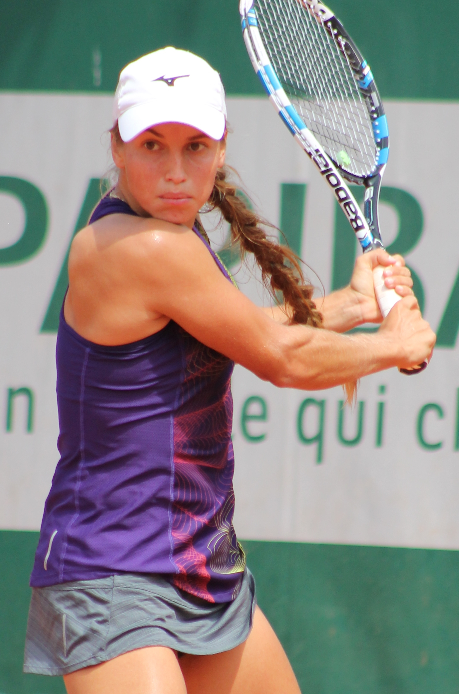 Putintseva RG16 (17)